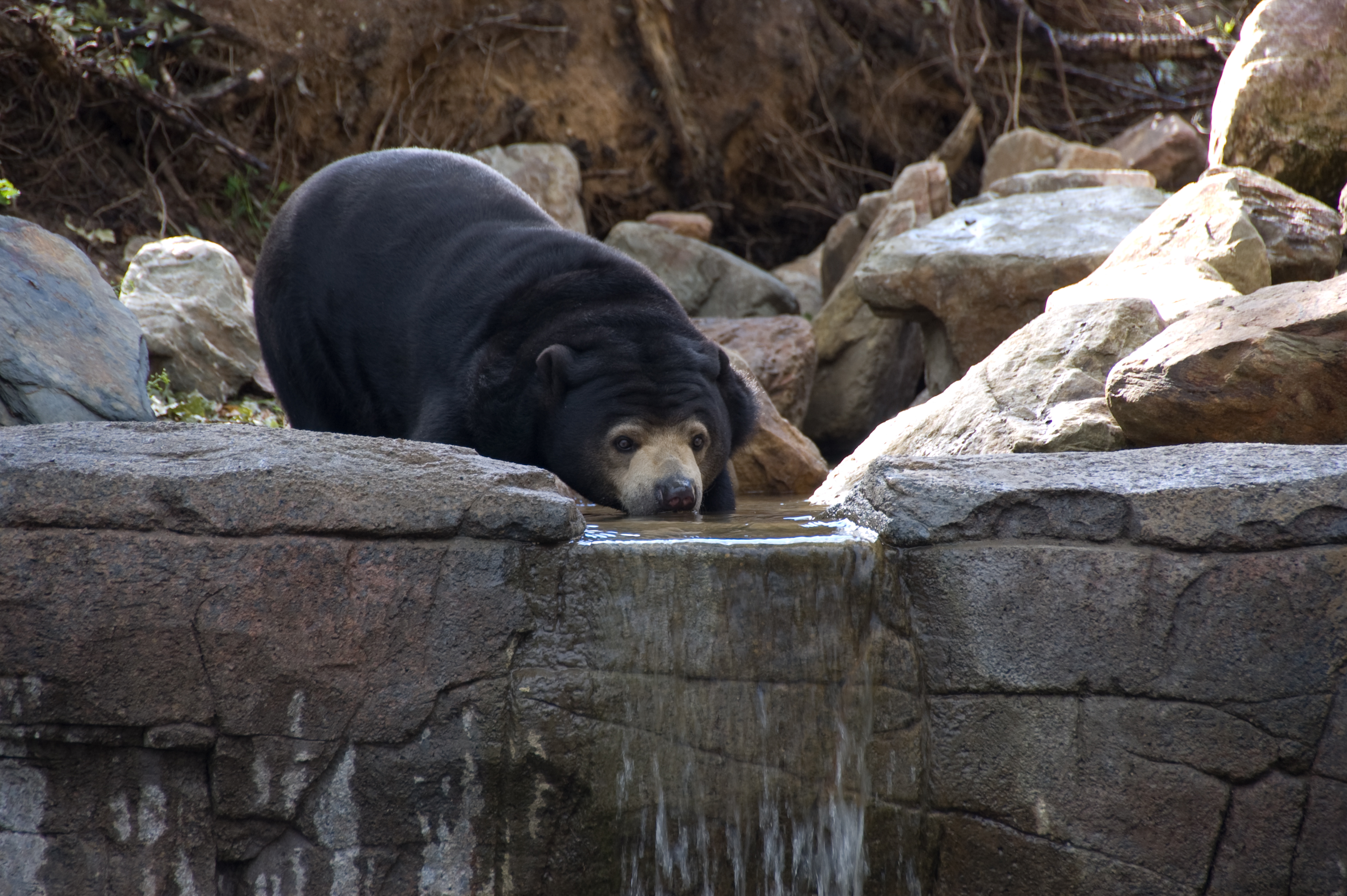 Maleise Beer